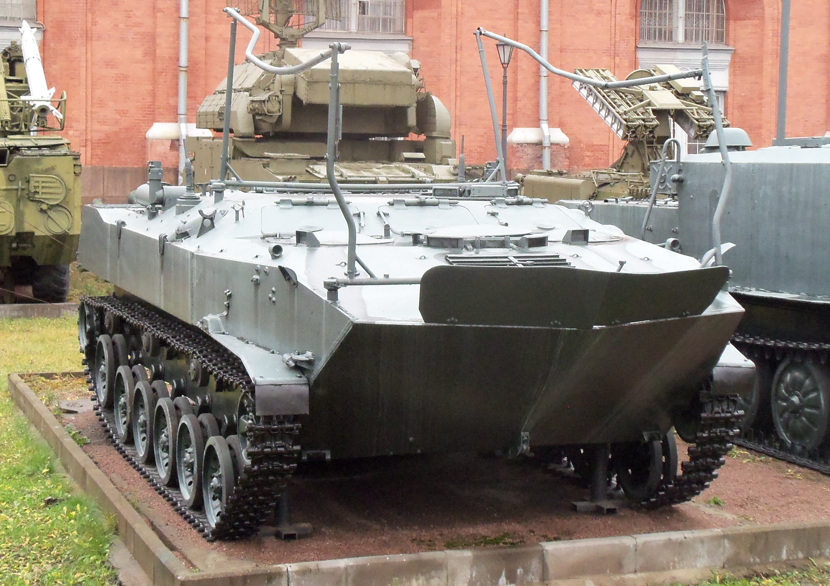 КШМки